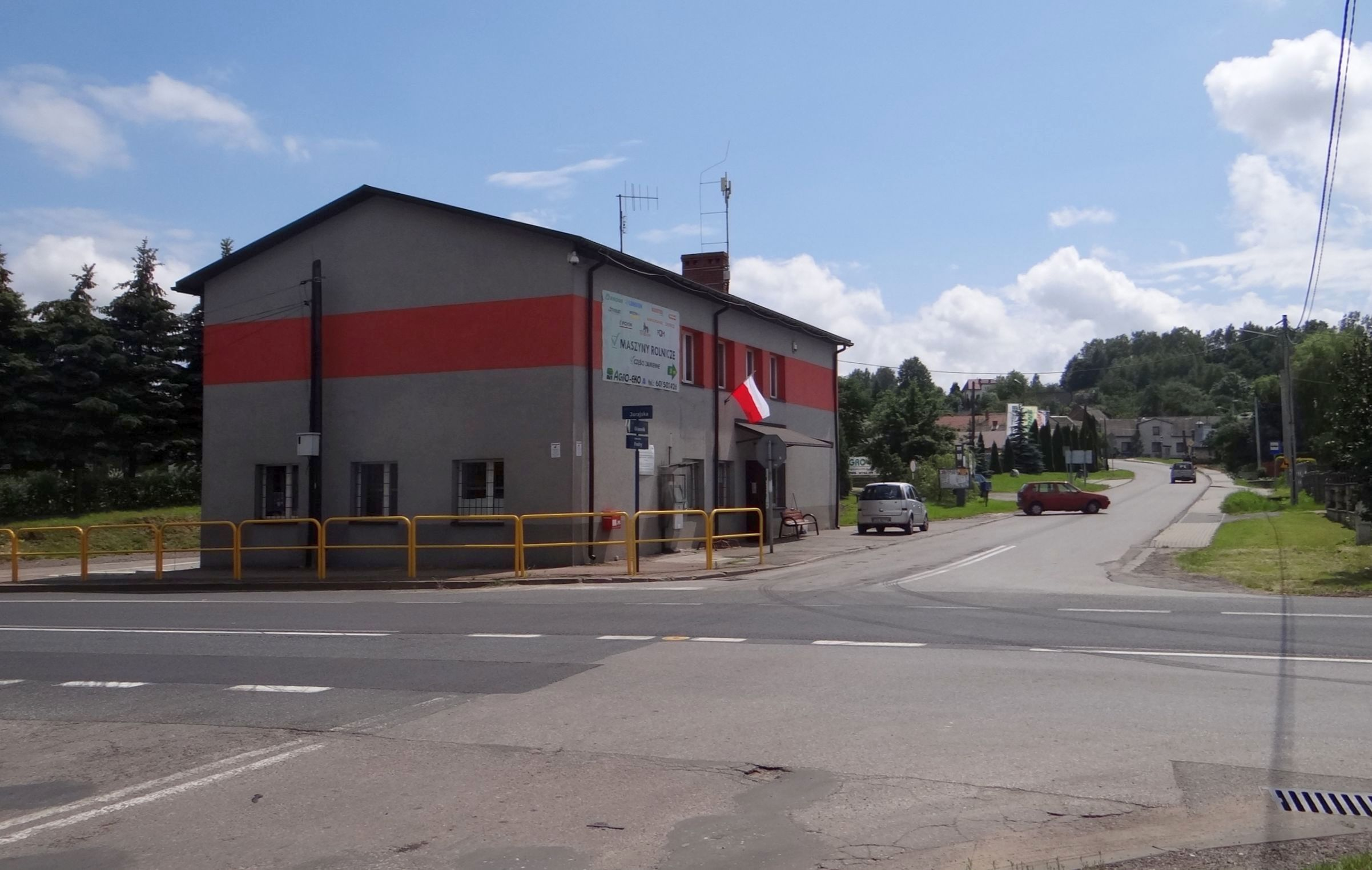 Skrzyżowanie dróg w Żerkowicach- Zawierciu